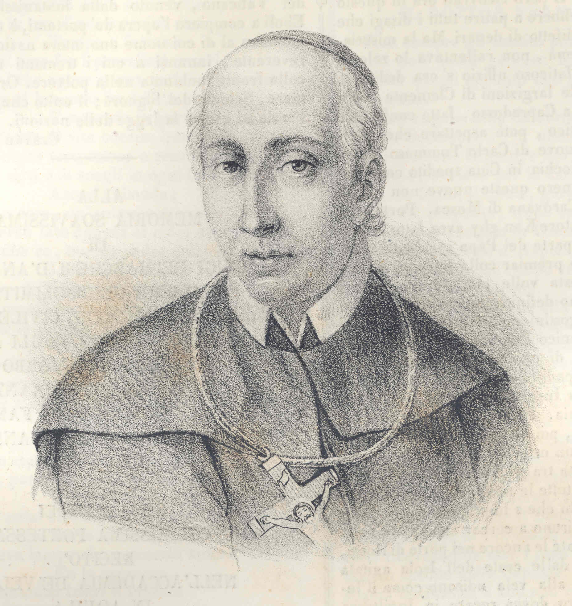 Ritratto di Matteo Ripa - autore sconosciuto, da Poliormama Pittoresco 1839, incisione da disegno, opera il cui autore Ã¨ morto da piÃ¹ di 70 anni, acquisita da scanner